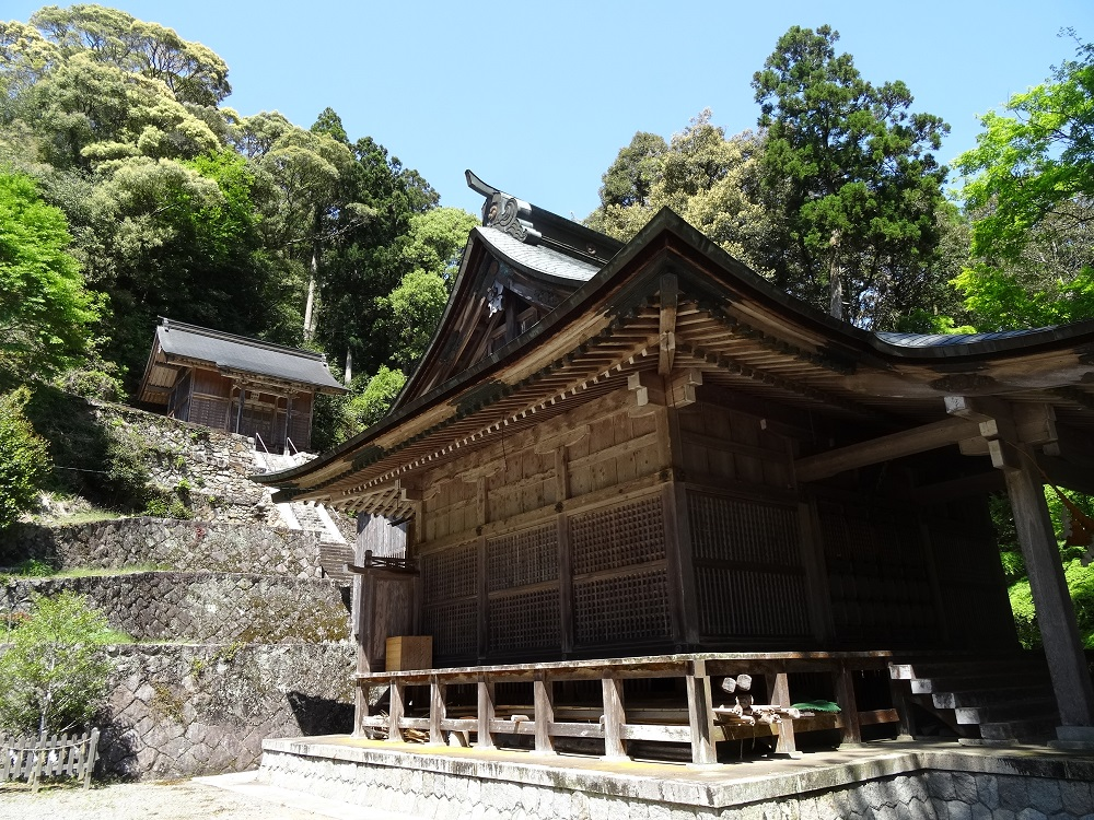 石座神社（岡崎市石原町）